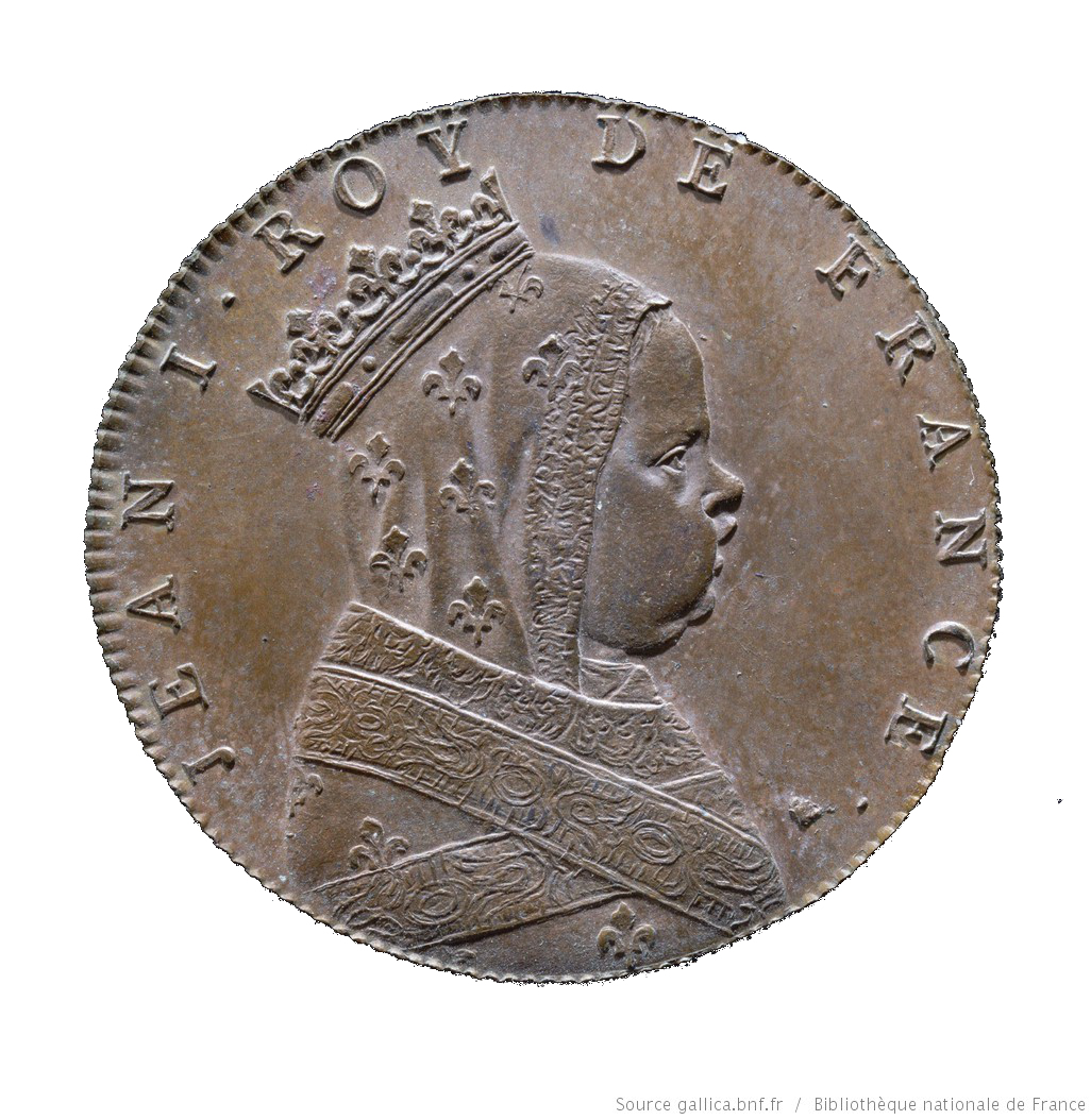 Jean Dassier (1676-1763) - Jean Ier le Posthume roy de France (1316). Buste du roi à droite, la tête ceinte d'une couronne fleurdelisée.